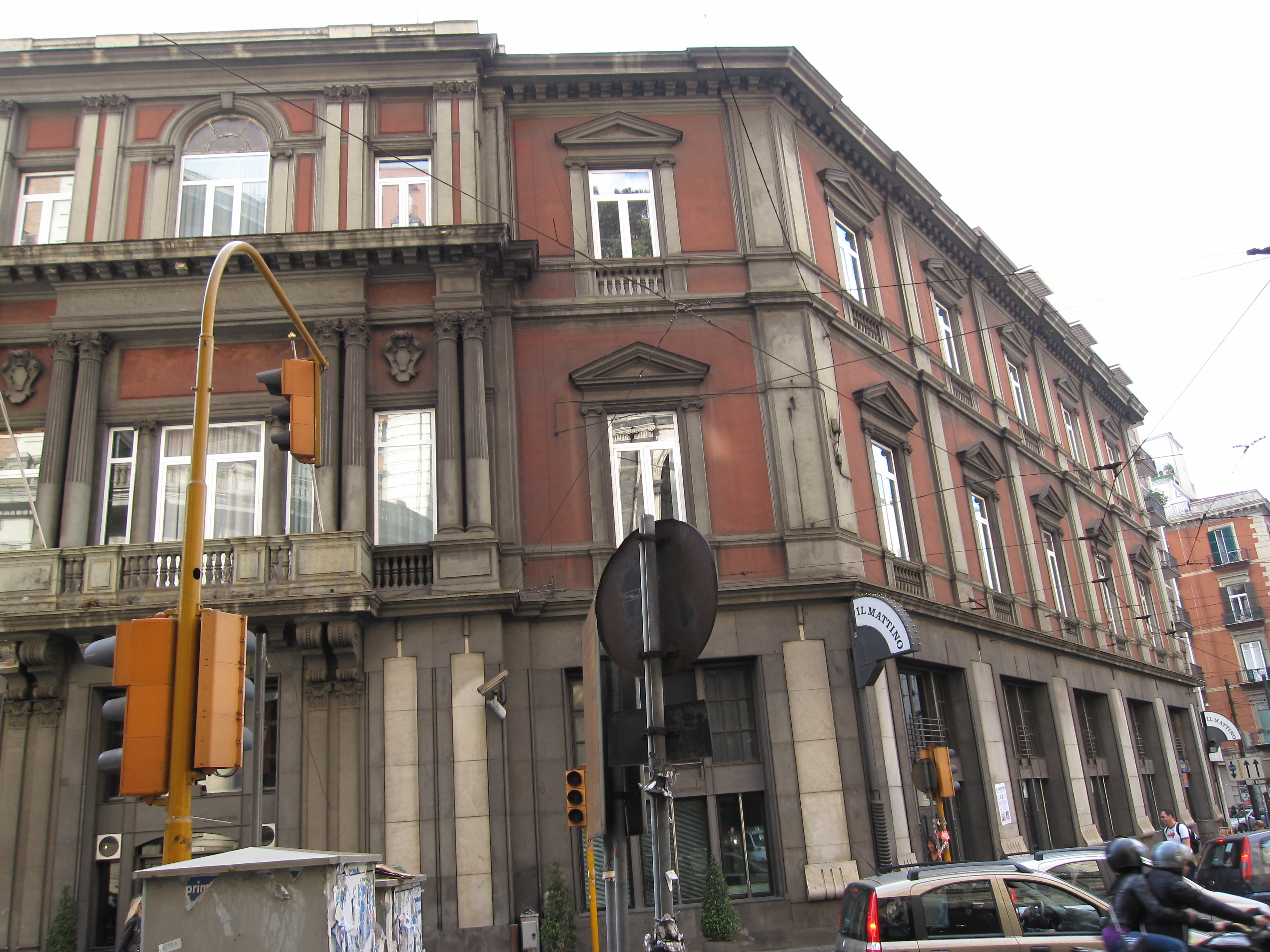 Compagnone - Fontana - Sede de Il Mattino (Via Chiatamone - Napoli) Realizzato tra il 1905 e il 1907.